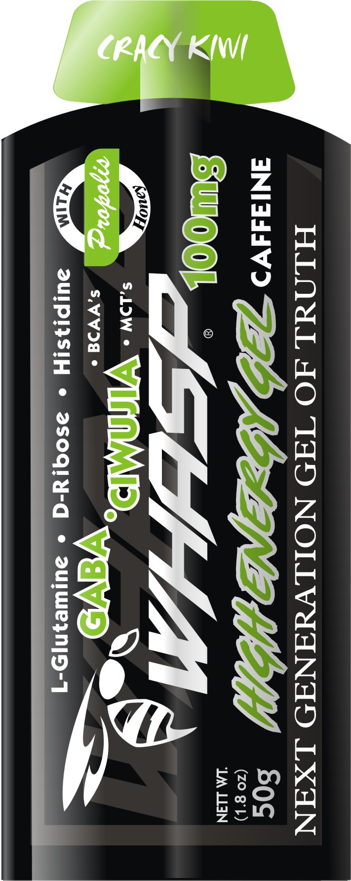 Whasp 100mg Caffeine Energy Gel Sachet